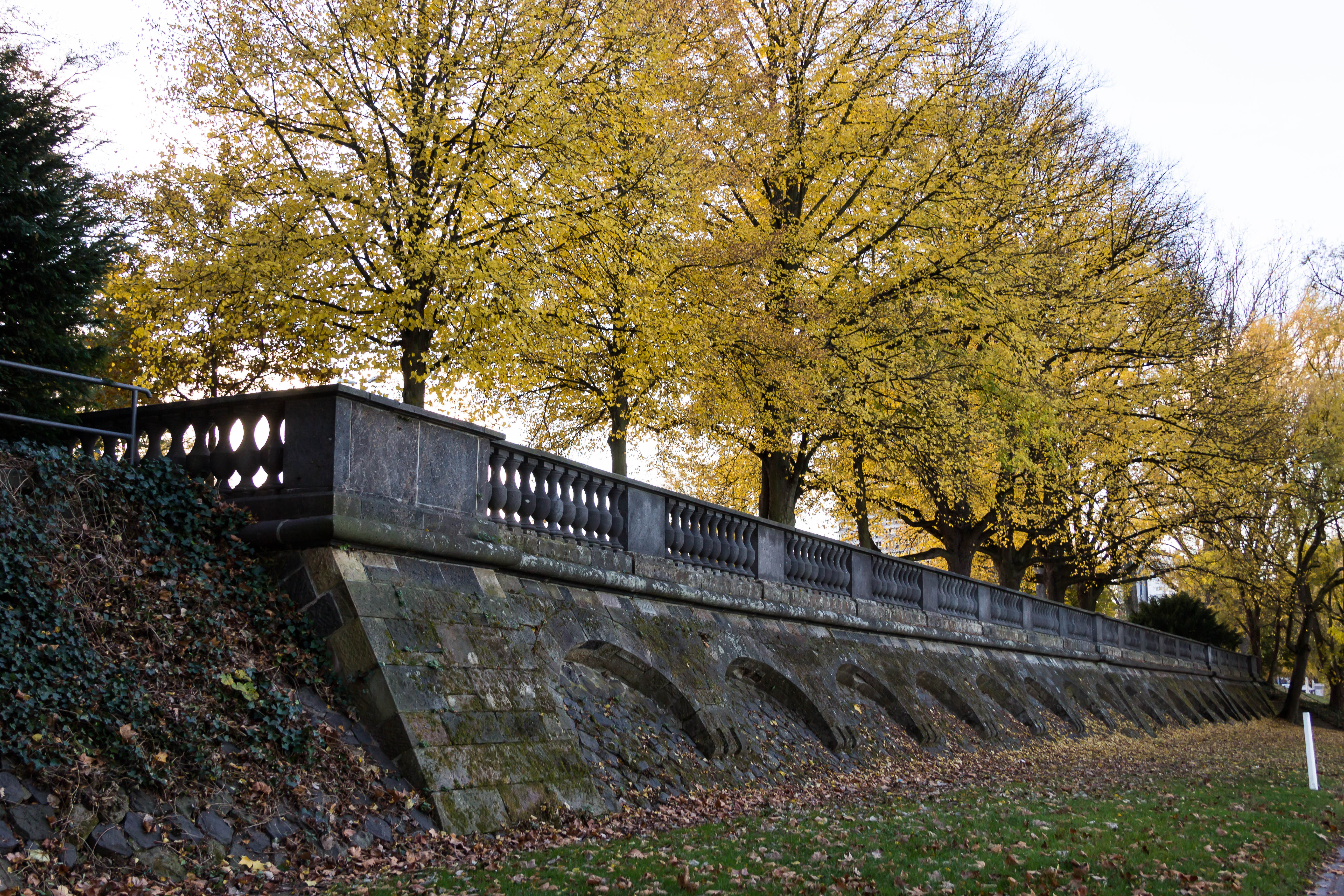 Reste der rheinseitigen Uferbefestigung und des steinernen Geländers der alten Stadthalle.Die Stadthalle war ein Veranstaltungsgebäude im Bonner Ortsteil Gronau, das von 1899 bis 1901 errichtet und nach Zerstörungen im Zweiten Weltkrieg 1953 gesprengt wurde. Sie befand sich unmittelbar am Rheinufer im Bereich des heutigen Freizeitparks Rheinaue und wurde im Volksmund Bierkirche genannt.